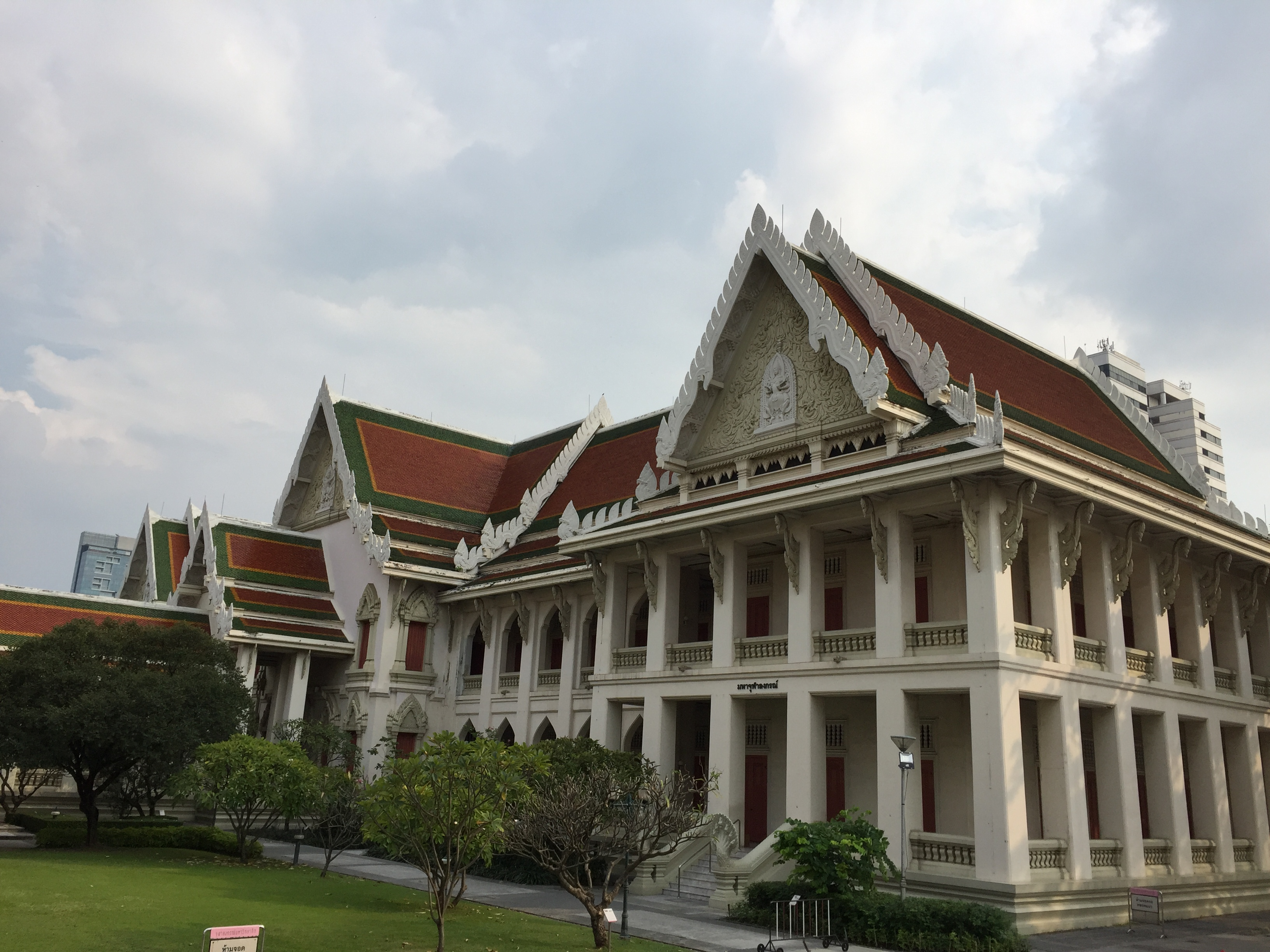 อาคารมหาจุฬาลงกรณ์ ตึกบัญชาการหลังแรกและอาคารหลังแรกของจุฬาลงกรณ์มหาวิทยาลัย